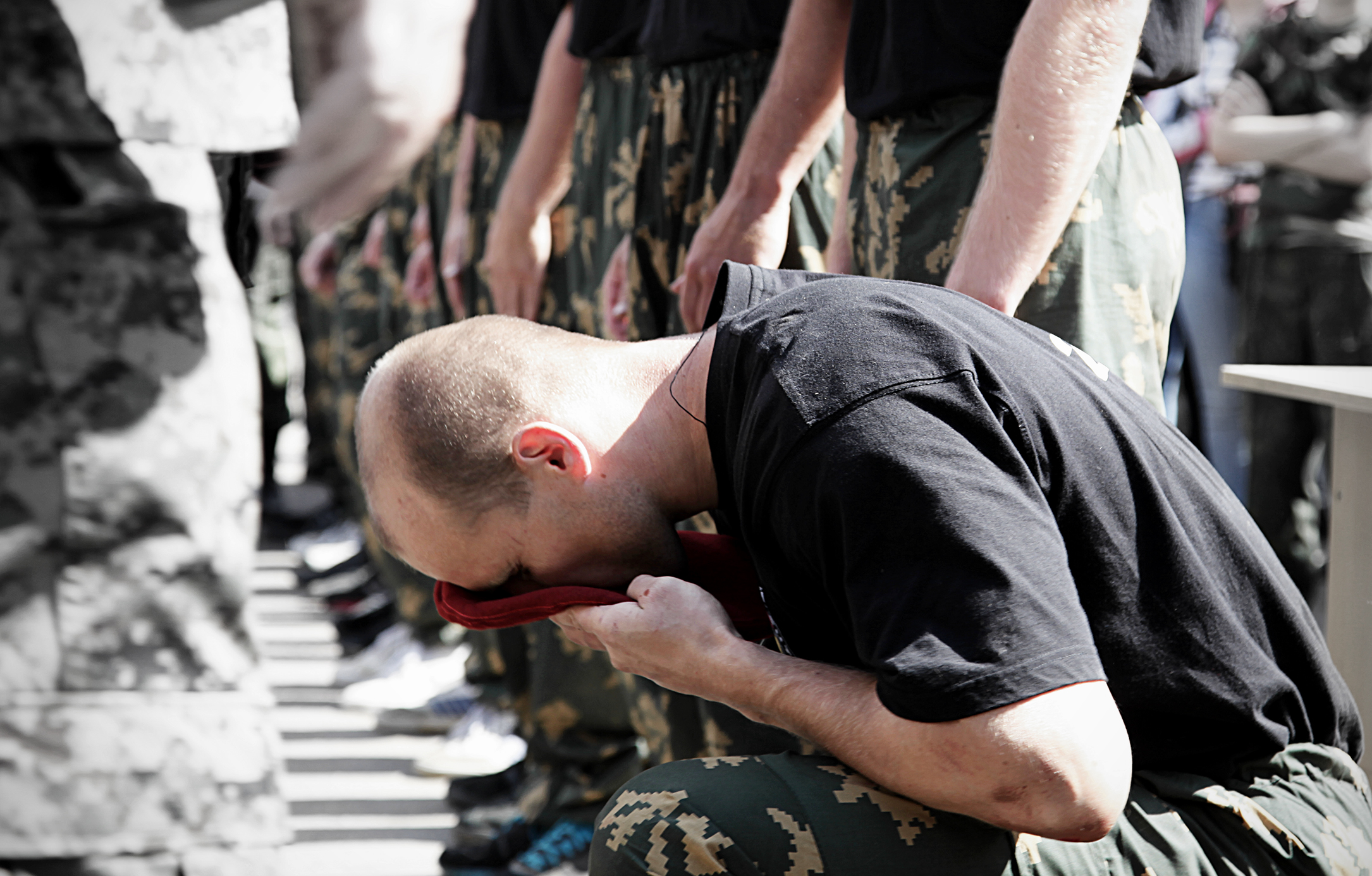 Вручени краповых беретов после испытаний